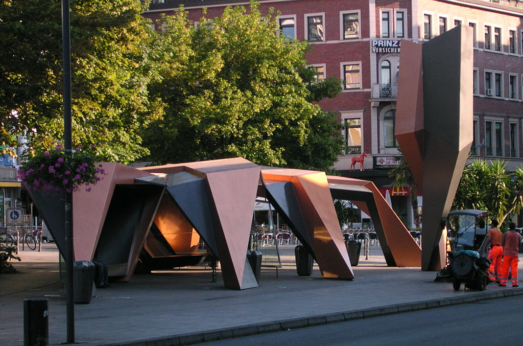 Aachen, Bushaltestelle am Friedrich-Wilhelm-Platz, wegen seiner Form "Frittezang" genannt. Architekt: Peter Eisenman.